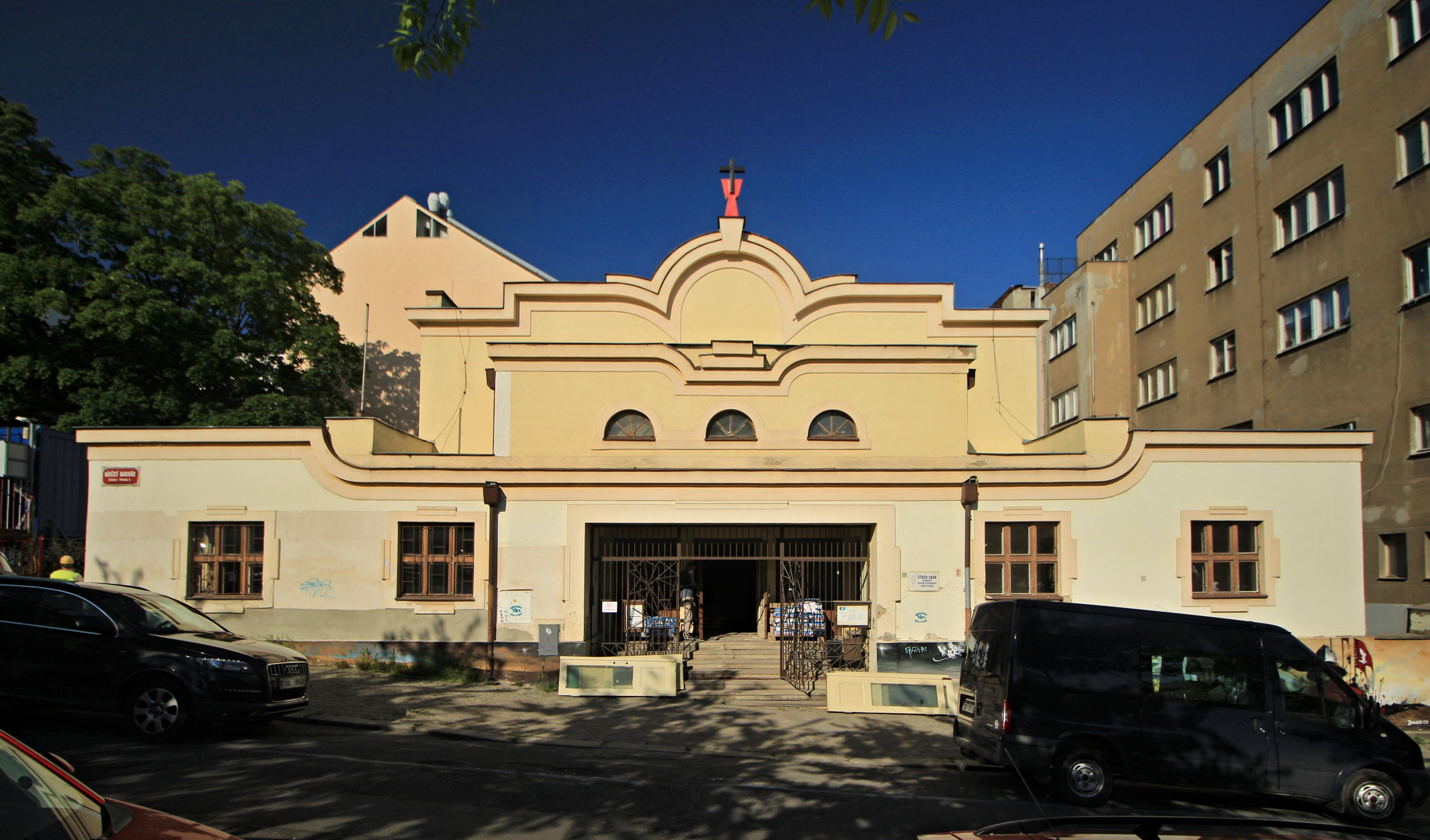 Žižkov náměstí Barikád, Husův sbor J. Žižky